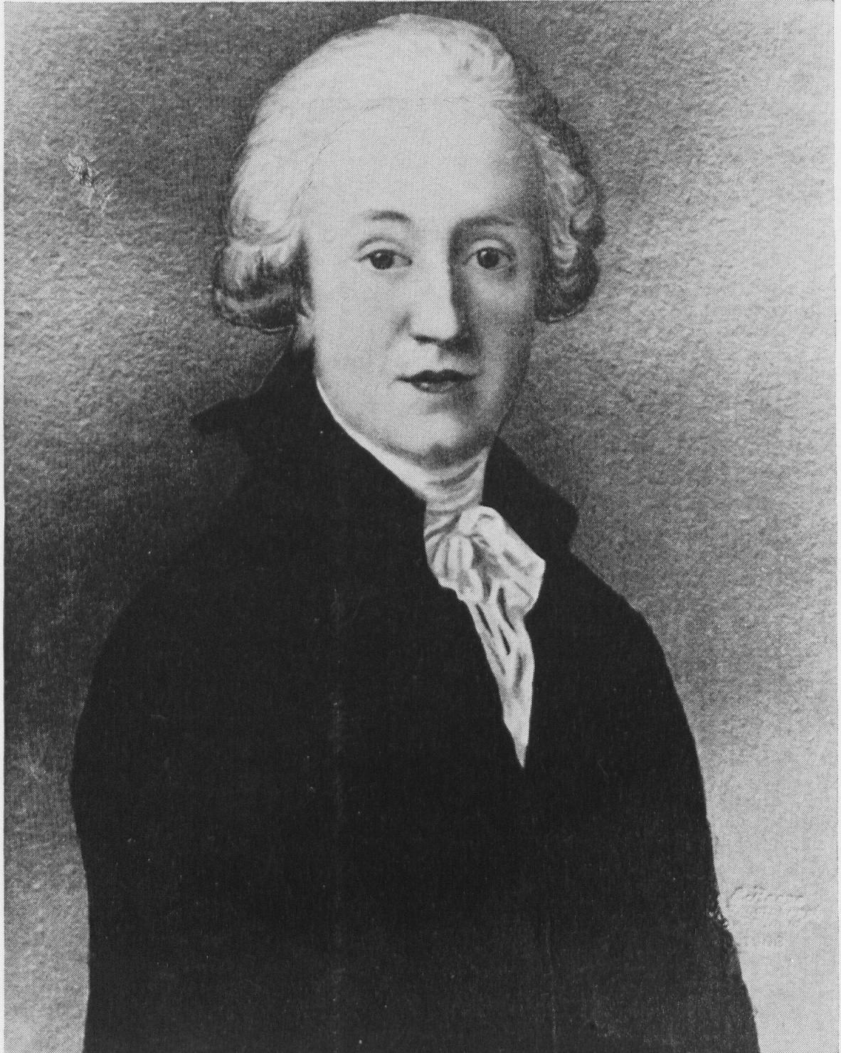 Fürst Leopold I. zur Lippe